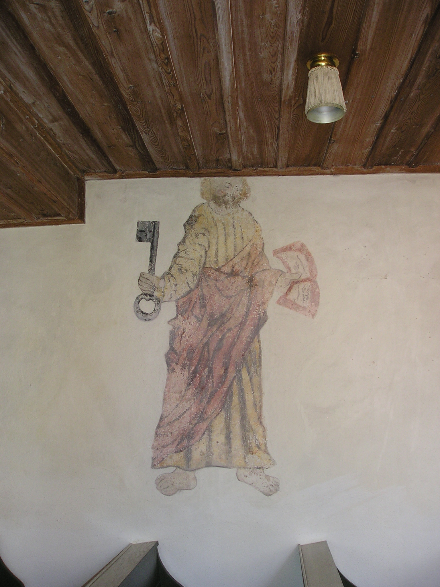 Bühl i. Ries, Gemeindeteil von Alerheim im Landkreis Donau-Ries (Bayern), Evang. St.-Marien-Kirche, Petrus-Fresko unter der Empore